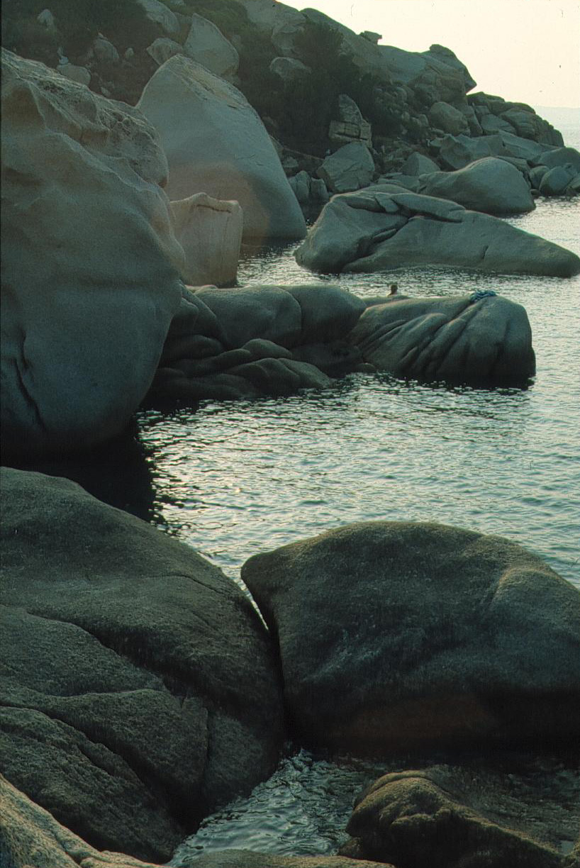 Cala Luna a Palau.